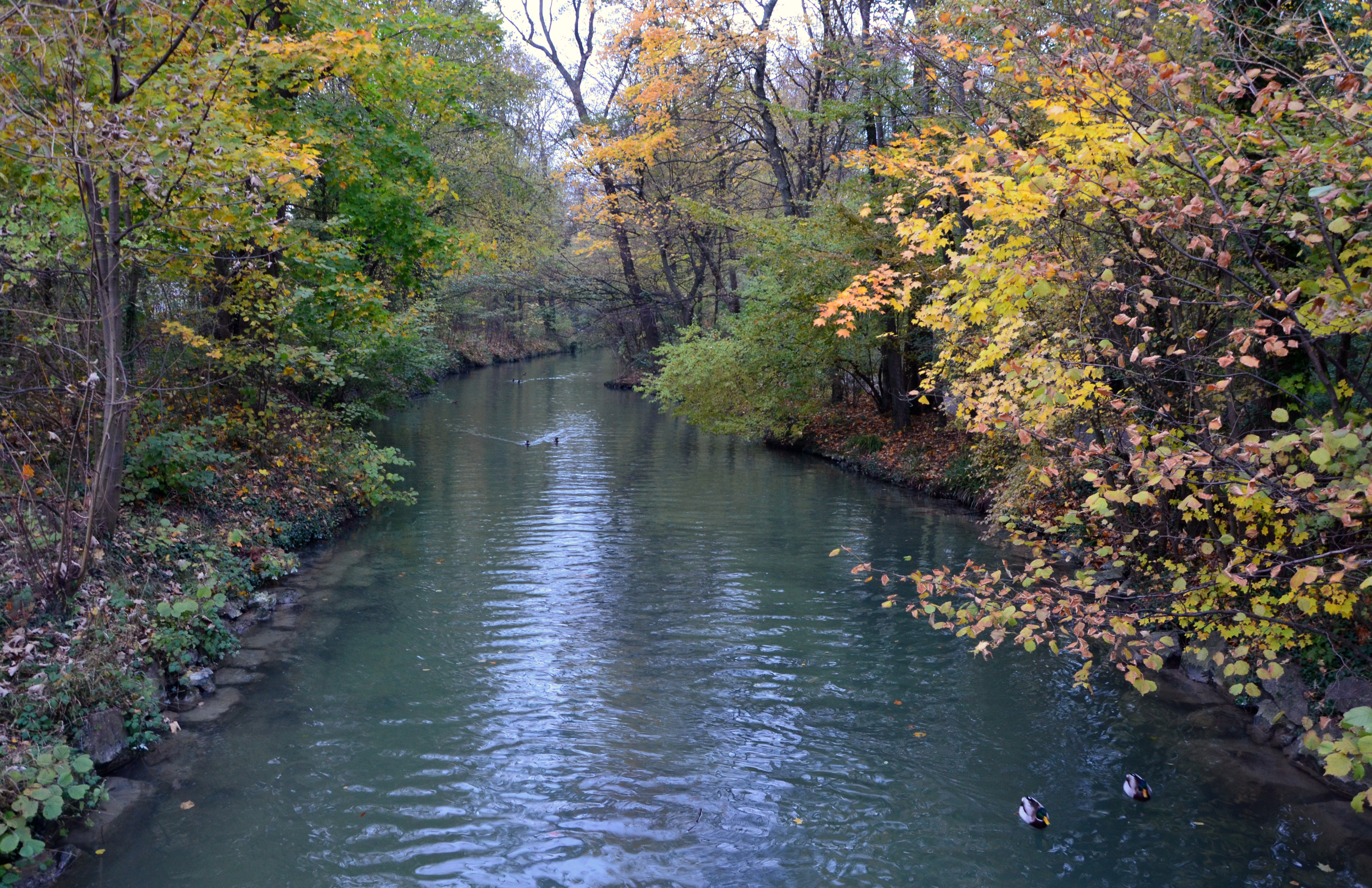 La Chamberonne entre St-Sulpice et Lausanne, juste avant qu'elle ne se jette dans le Lac Léman